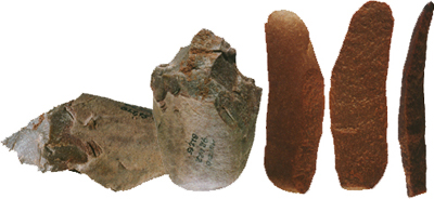 pic distal en quartzite gris et éclat laminaire en quartzite brun station paléo. moyen de Mutzig Felsbourg (67)